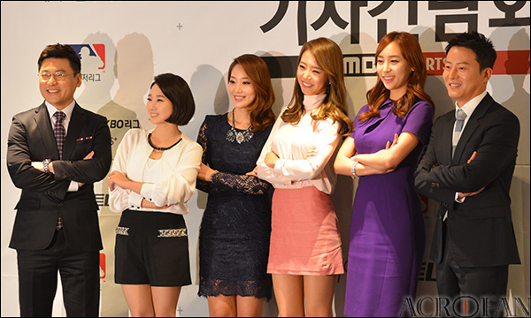 MBC 2015 메이저리그 & KBO리그 기자간담회